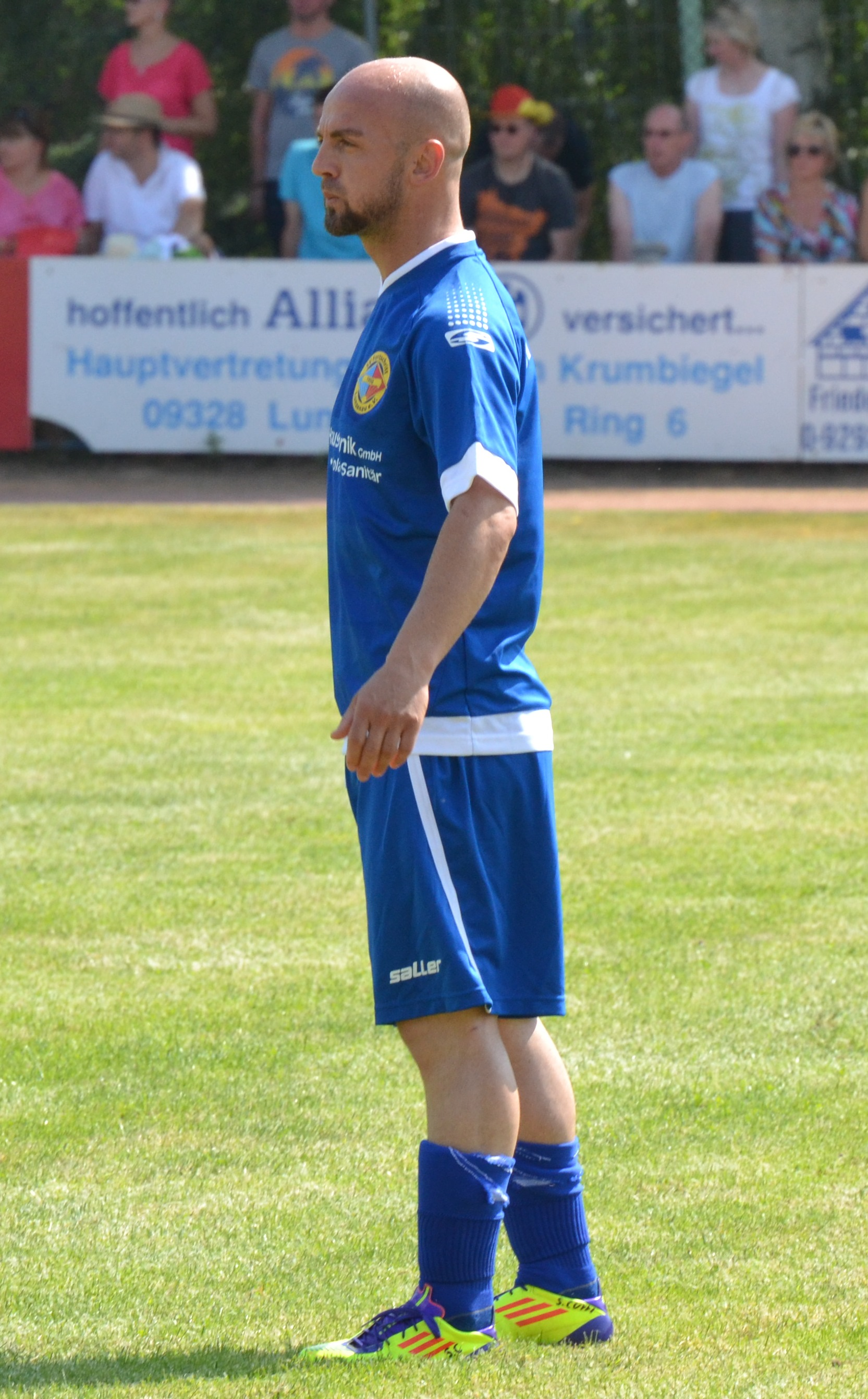 Skerdilaid Curri als Gastspieler bei einem Freundschaftsspiel im Trikot vom SV Fortschritt Lunzenau gegen die Traditionsmannschaft des BVB.